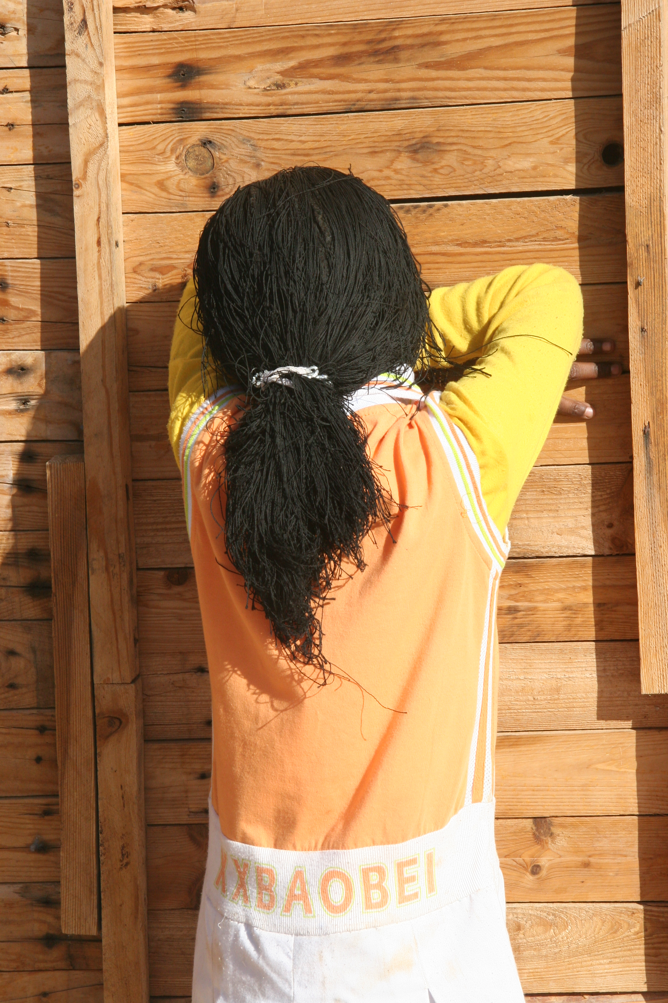 Mauritania, January 2008